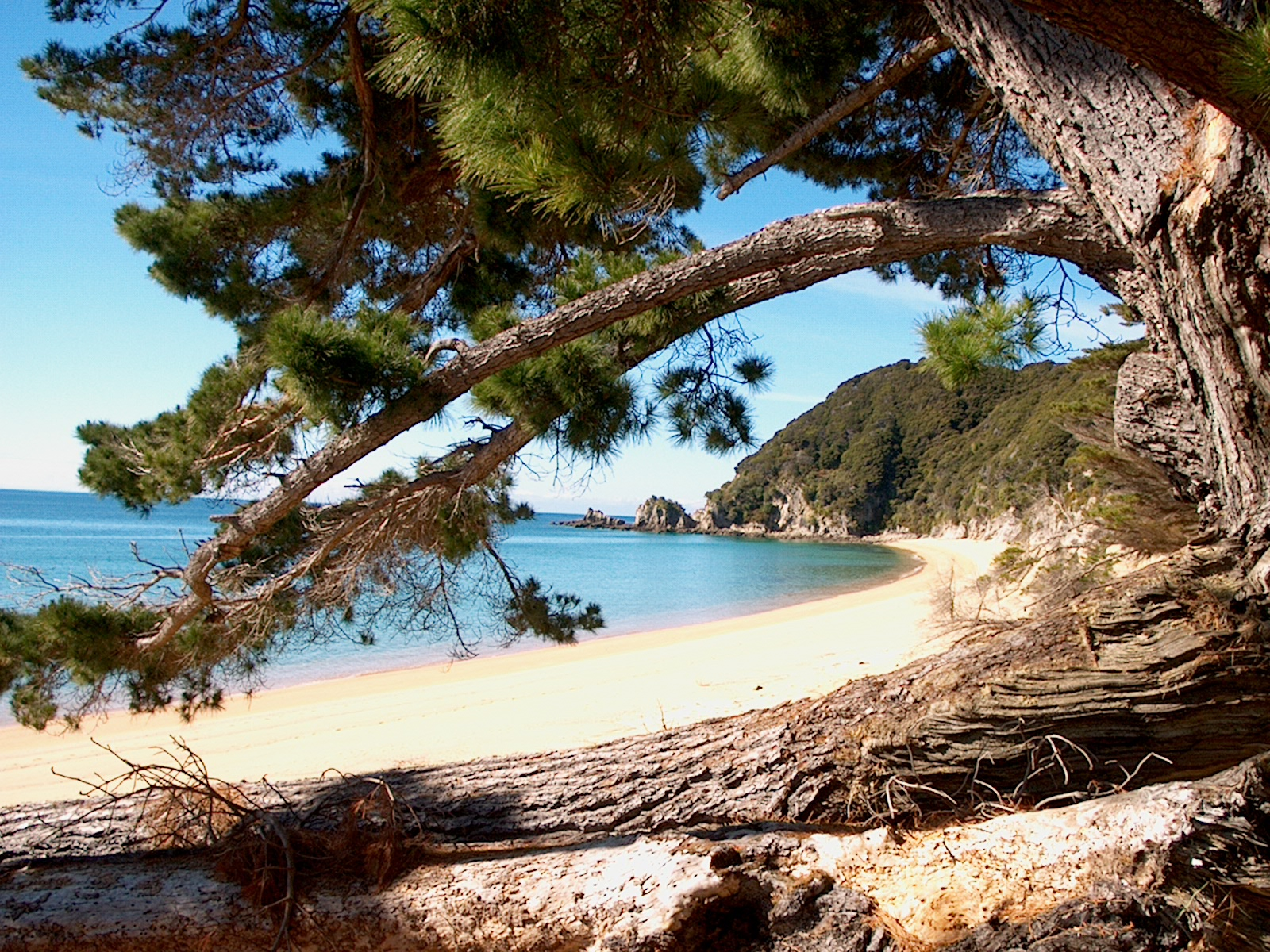 Anatakapau Bay in the Abel Tasman National Park.